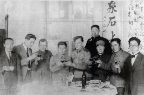 安东保安司令部司令员吕其恩（右二），政委邹大鹏（左四），冀热辽十六军分区特务二团政治主任陶守崇（右三）和苏军驻安东警备司令部司令列格牛希（左五）等人1945年在鸭春江饭庄合影。其他人为翻译曲桐修（左一）、刘炳南（左二）、万里鞋店经理（右一）和饭庄经理（后立者）。